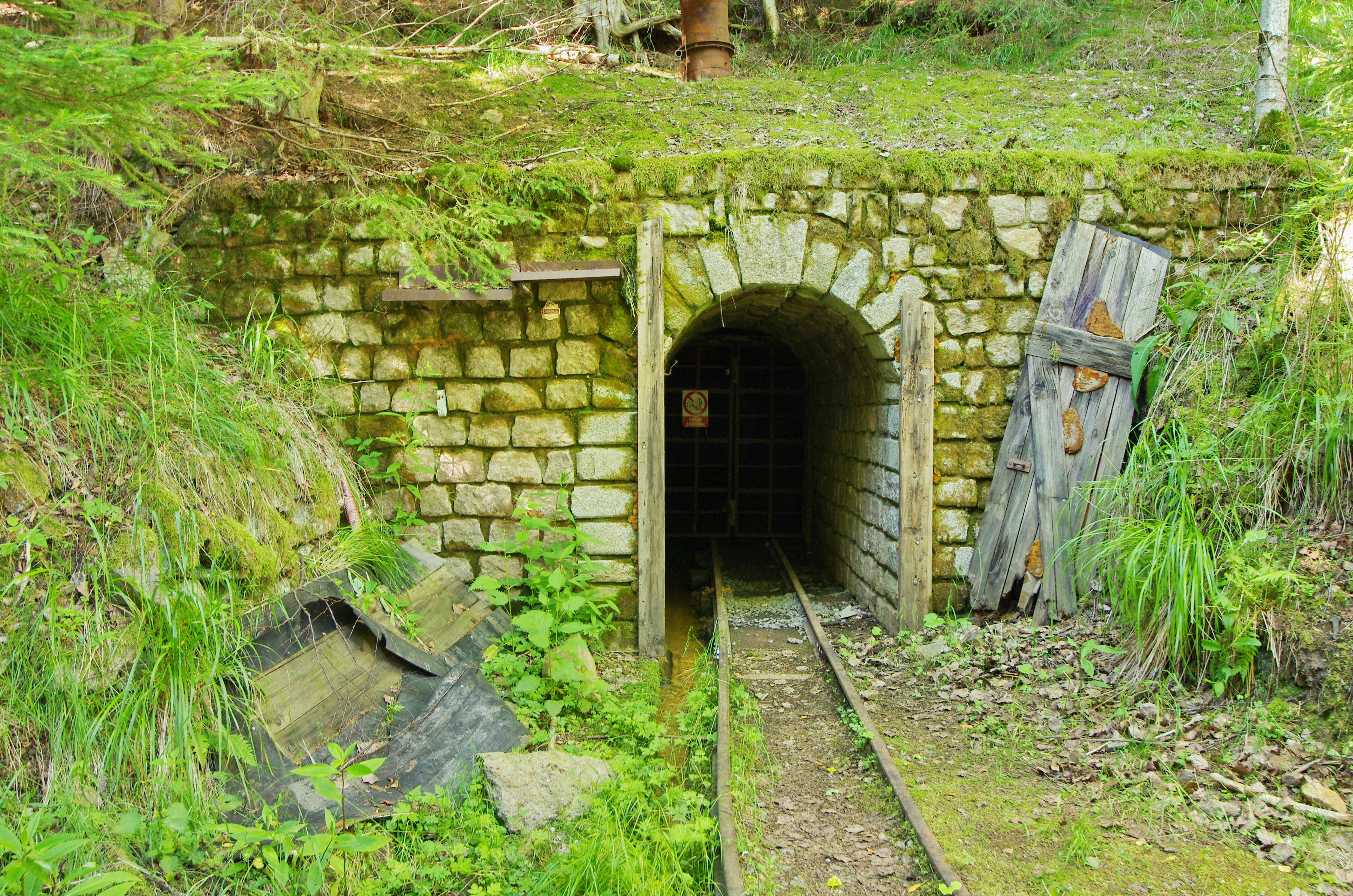 Dědičná (odvodňovací) štola dolu Jeroným ve Slavkovském lese, okres Sokolov